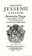 Titelblatt der Anatomiae von Jan Jessenius